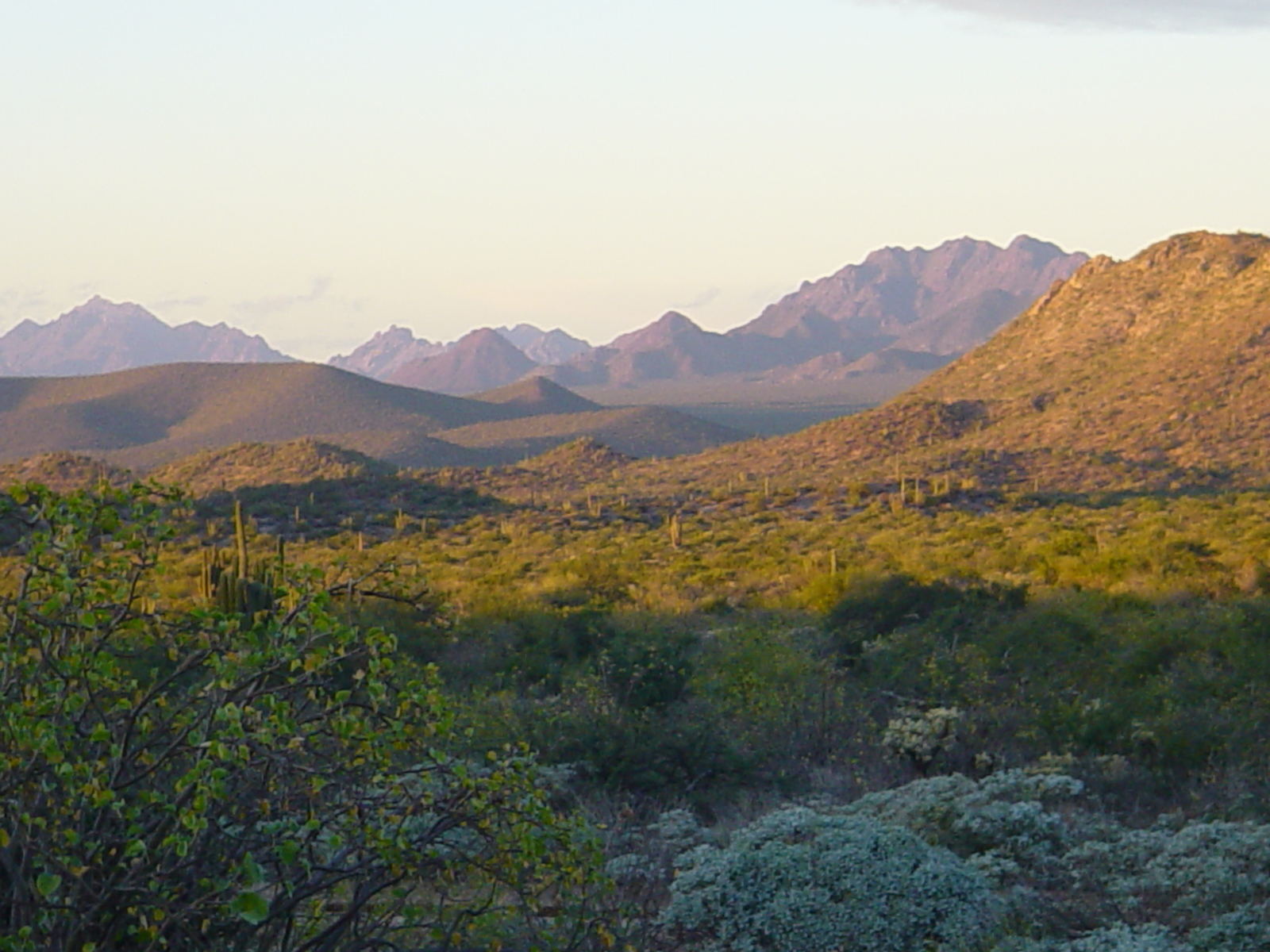 paisaje en la zona del ejido Seri / landscape / Sonora Mexico